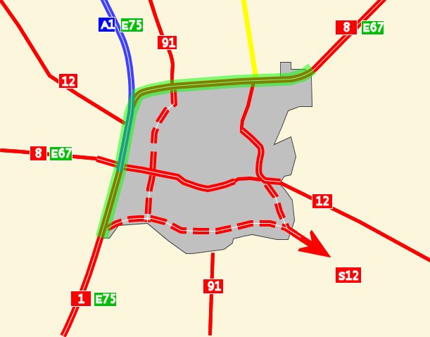 Schemat przedstawiający pónocno zachodnią obwodnicę m. Piotrkowa Trybunalskiego